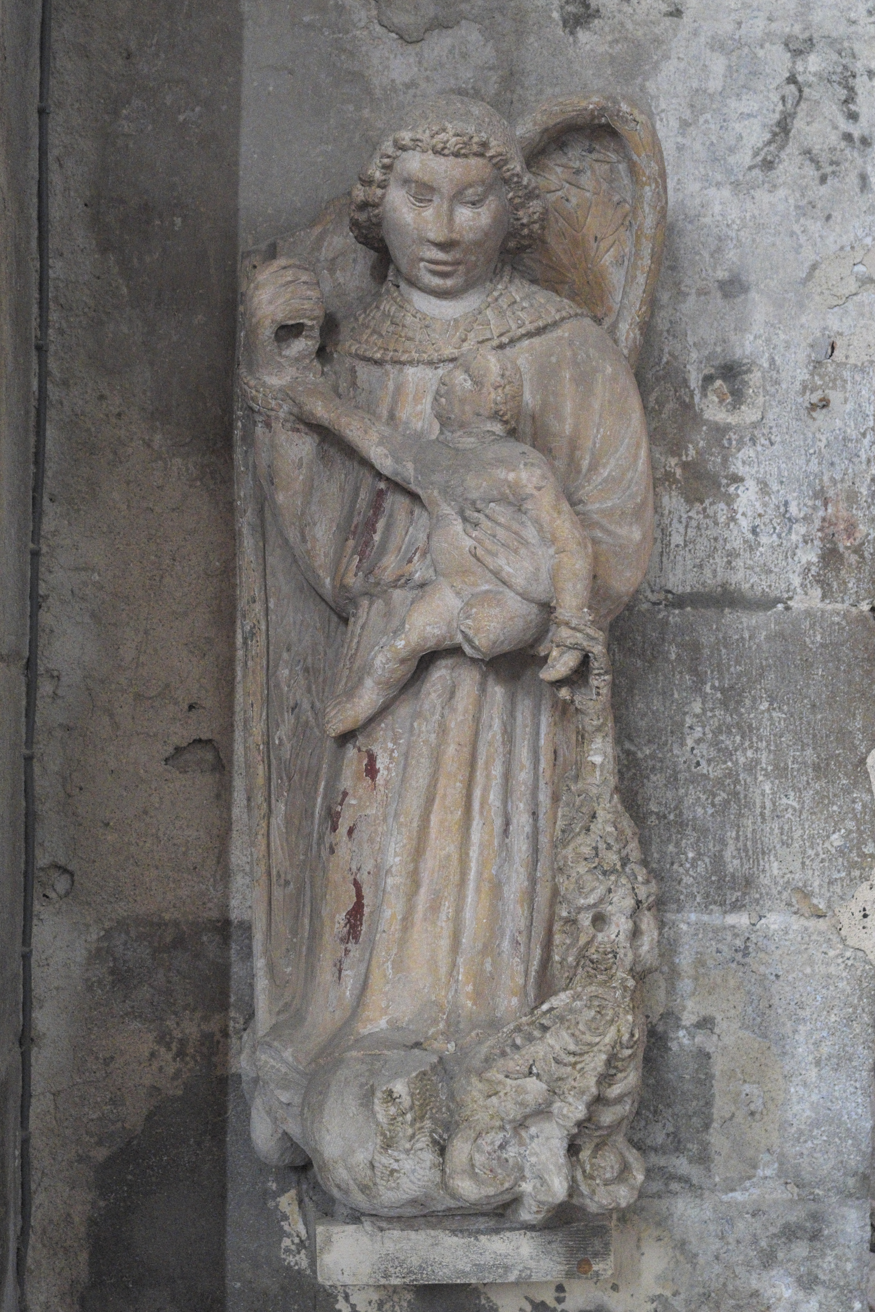 Katholische Pfarrkirche, ehemalige Stiftskirche, Saint-Cerneuf in Billom im Département Puy-de-Dôme (Auvergne-Rhône-Alpes), Erzengel Michael (?)